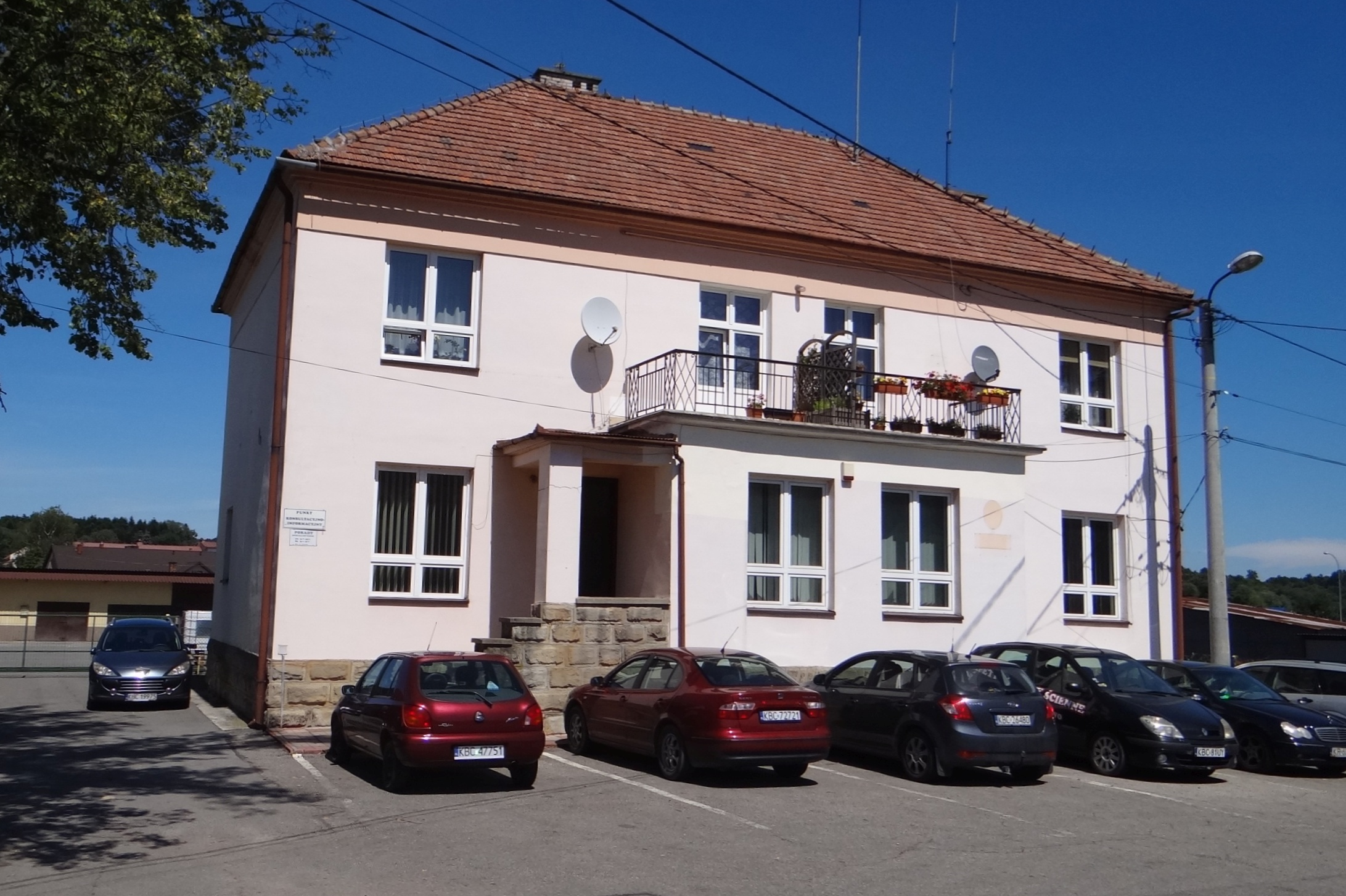 Łapanów. Budynek policji